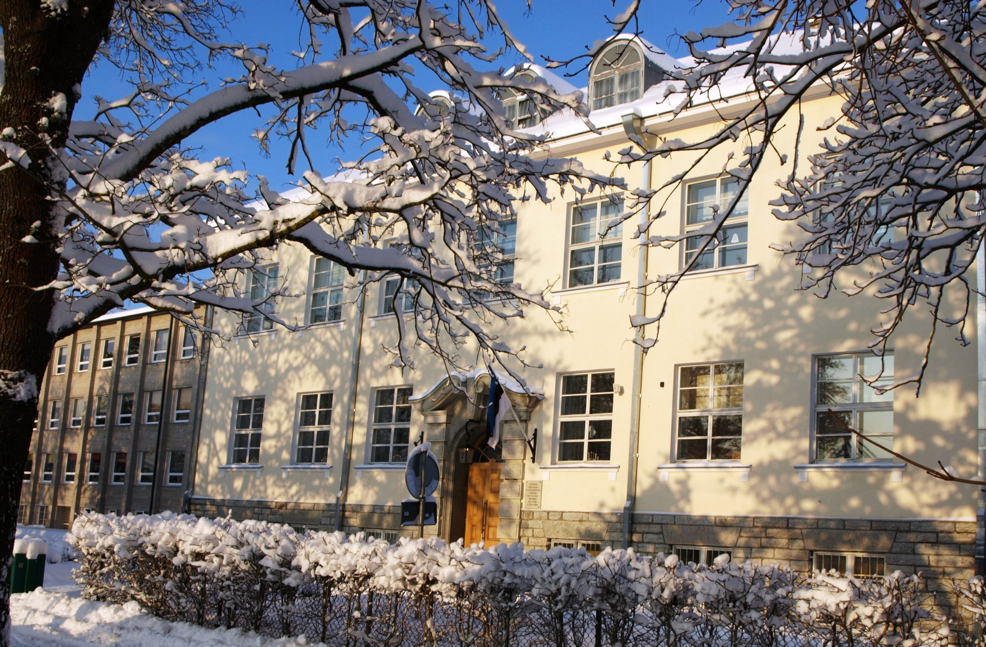 Keila Algkooli hoone talvel.